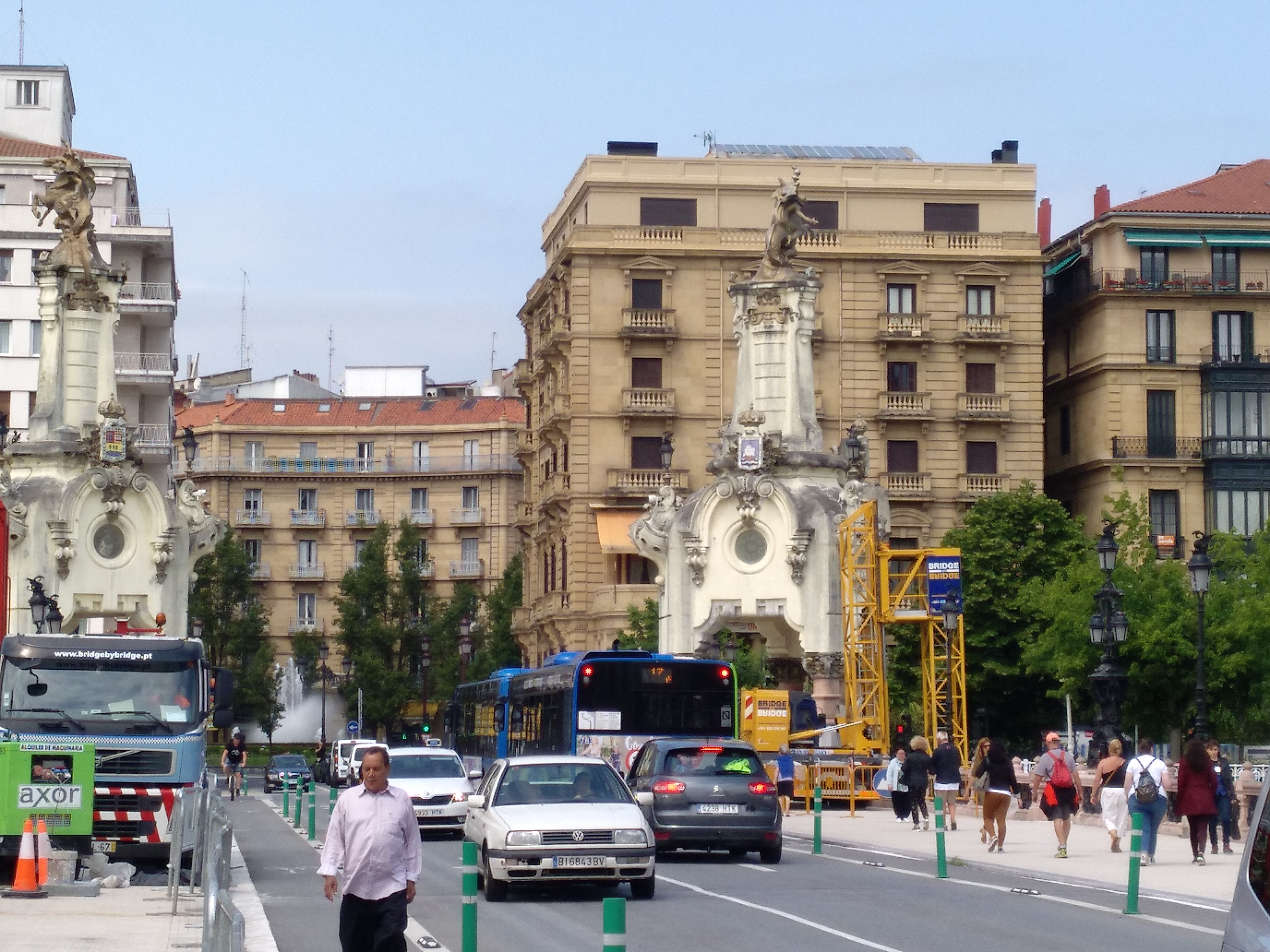 Autobús de d·bus cruzando el puente de María Cristina en San Sebastián